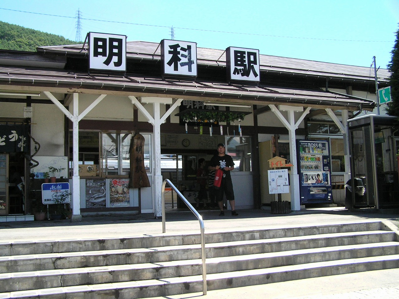 東日本旅客鉄道（JR東日本）篠ノ井線 明科駅